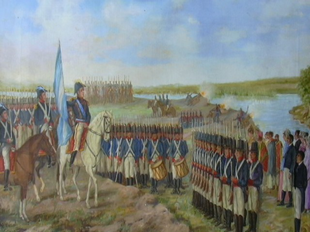 Retrato del Gral. Belgrano, jurando la Bandera Nacional en las Barrancas del río Paraná en 1812. Óleo sobre tela. Autor : Rafael del Villar. Fecha de ejecución: 1947. Dimensiones: L: 63 cm / A: 94 cm. Donacion de: Comisión Nacional de Homenaje al Gral. Belgrano. Complejo Museográfico Provincial 'Enrique Udaondo', Luján, Provincia de Buenos Aires, Argentina.